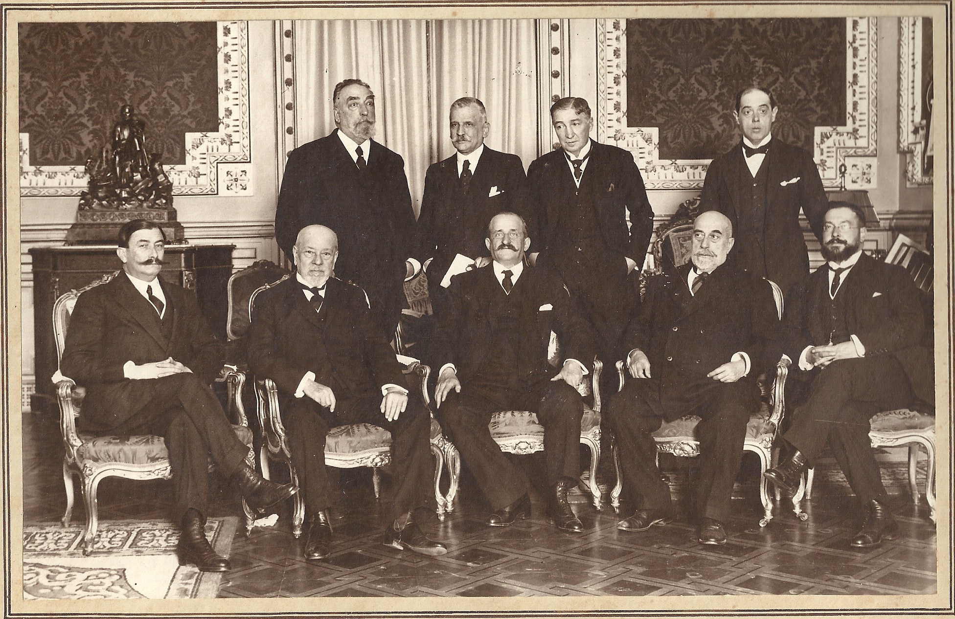 Foto del Gobierno de Romanones del año 1918. En primera fila, de izda. a dcha.:1) Dámaso Berenguer, 2) ¿?, 3) Conde de Romanones, 4) Alexandre Rosselló i Pastors, 5) Baldomero Argente del Castillo. En segunda fila, de izda. a dcha.: 1) Fermín Calbetón y Blanchón, 2) Amalio Gimeno Cabanas, 3) ¿? y 4) Joaquin Salvatella